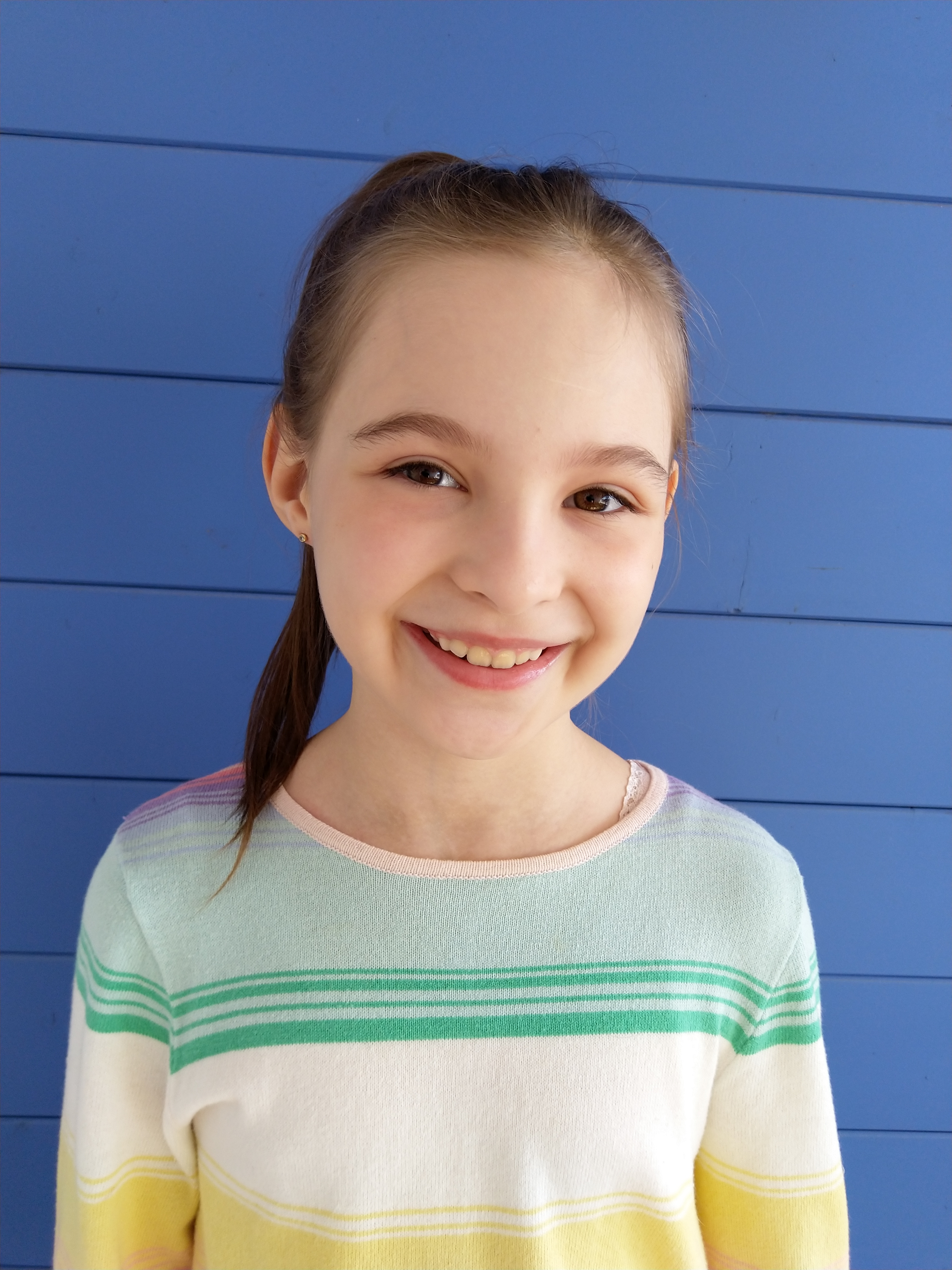 Isabel Steszgal, 2020